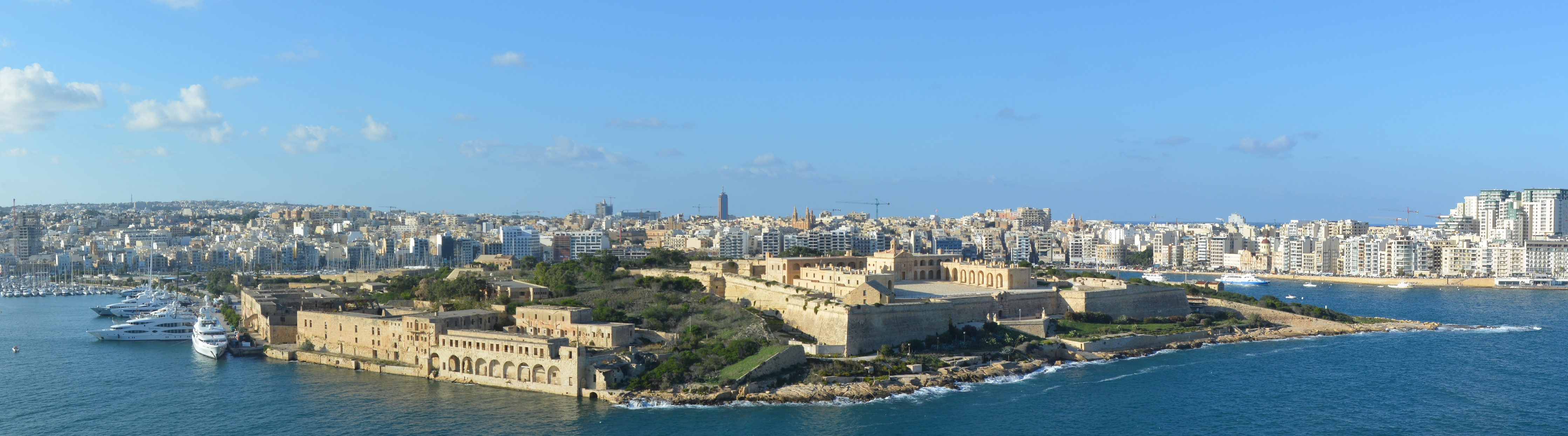 Vue panoramique du Fort Manoel, La Valette, Malte